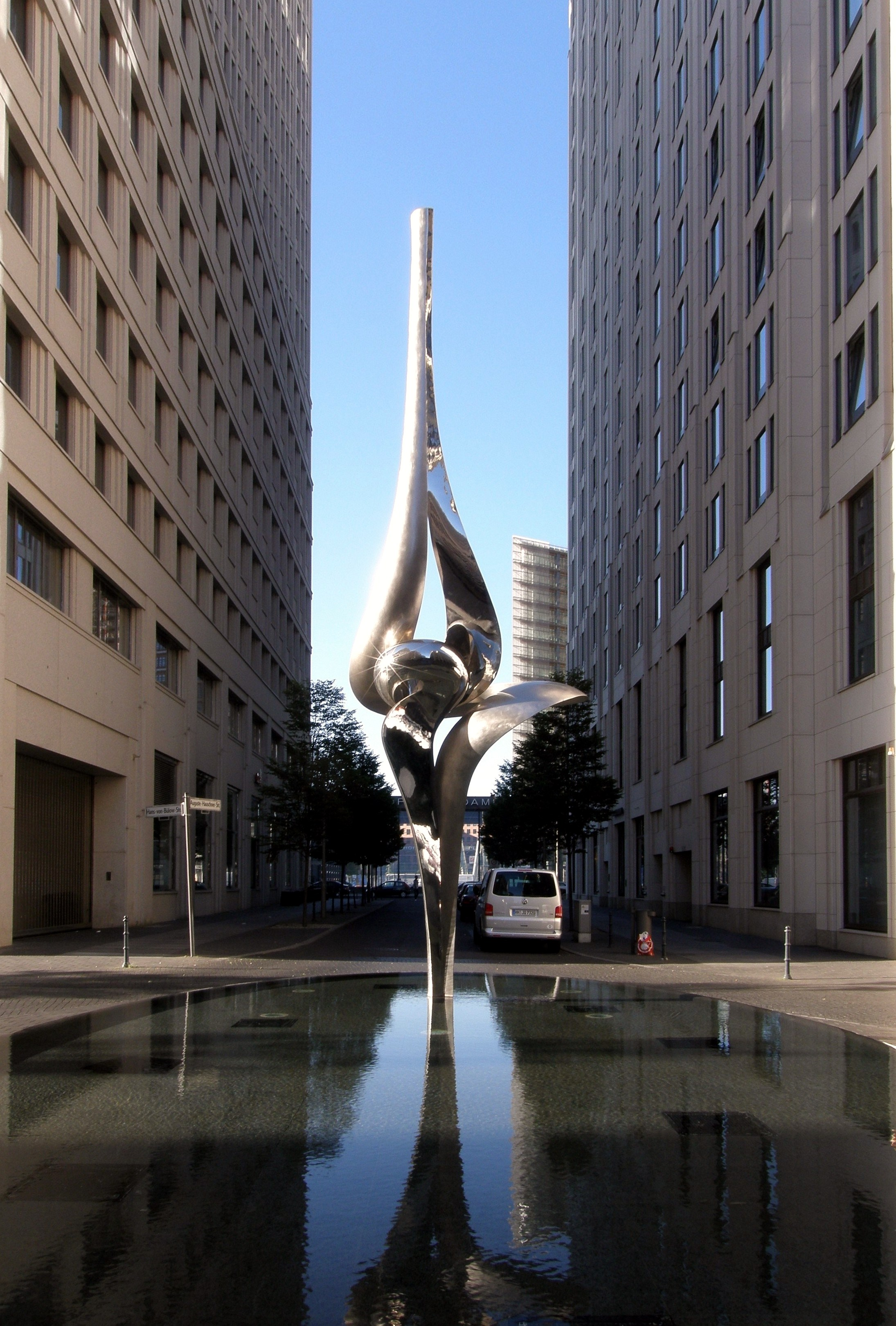 Gidon Graetz - Phoenix. 2003, Edelstahl. Inge-Beisheim-Platz, Berlin-Tiergarten.